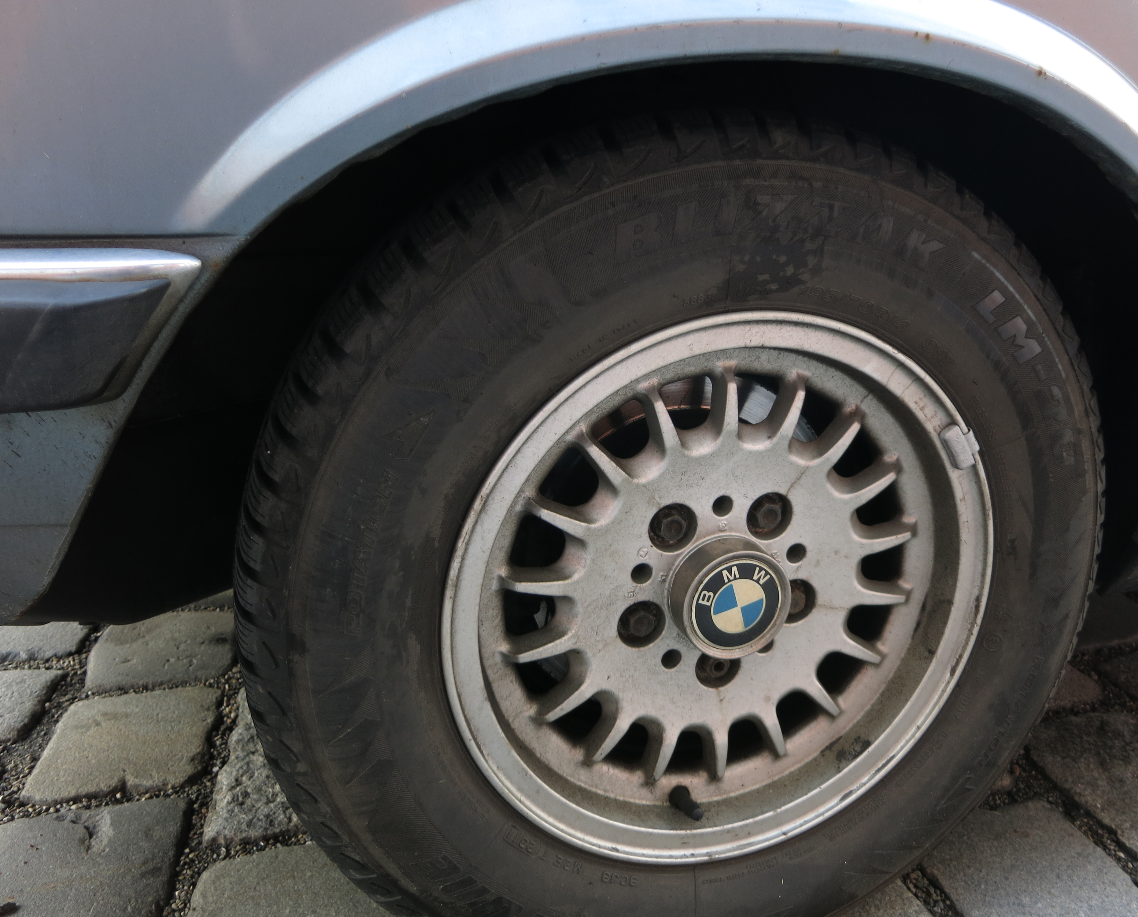 BMW E28 520i Bj. 1986 Hinterrad hinten rechts, gut sichtbare Scheibenbremse. 356-mm-Felge